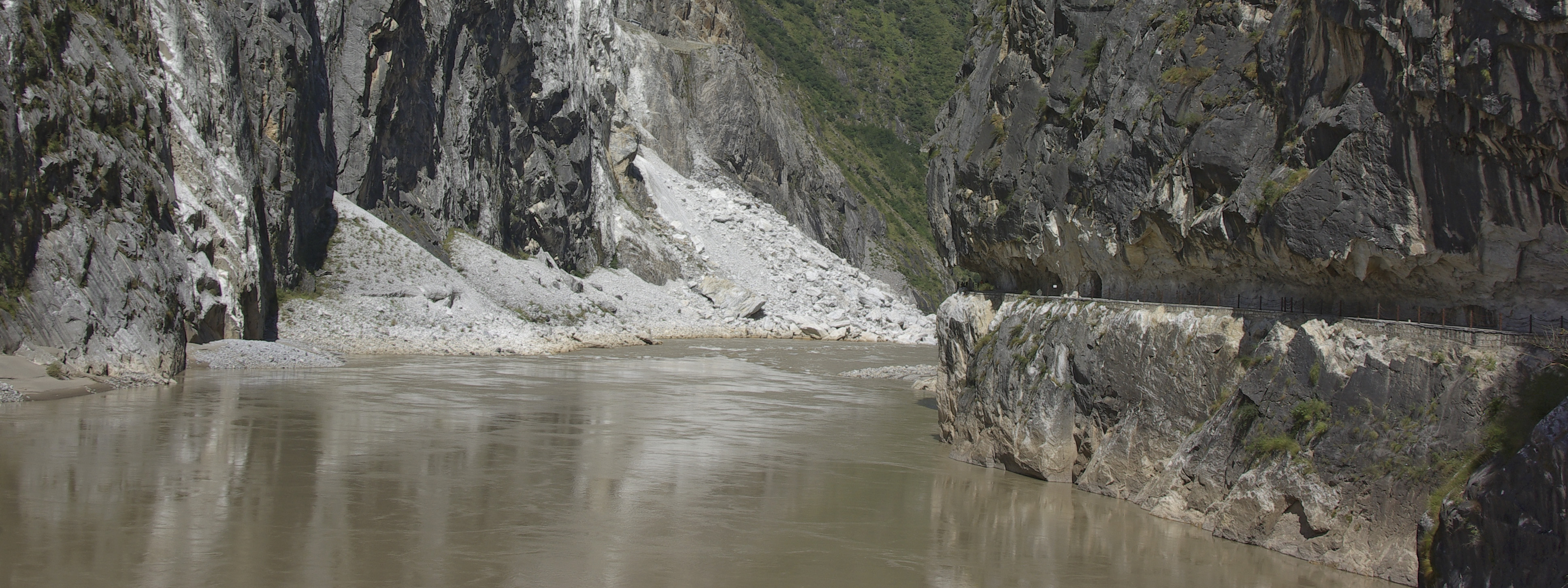 The site of the Tiger Leaping Gorge, a narrow tortuous gorge on the Yangzi River between the towring Mount Haba and the Jade Dragon Snow Mountain, Yunnan, China